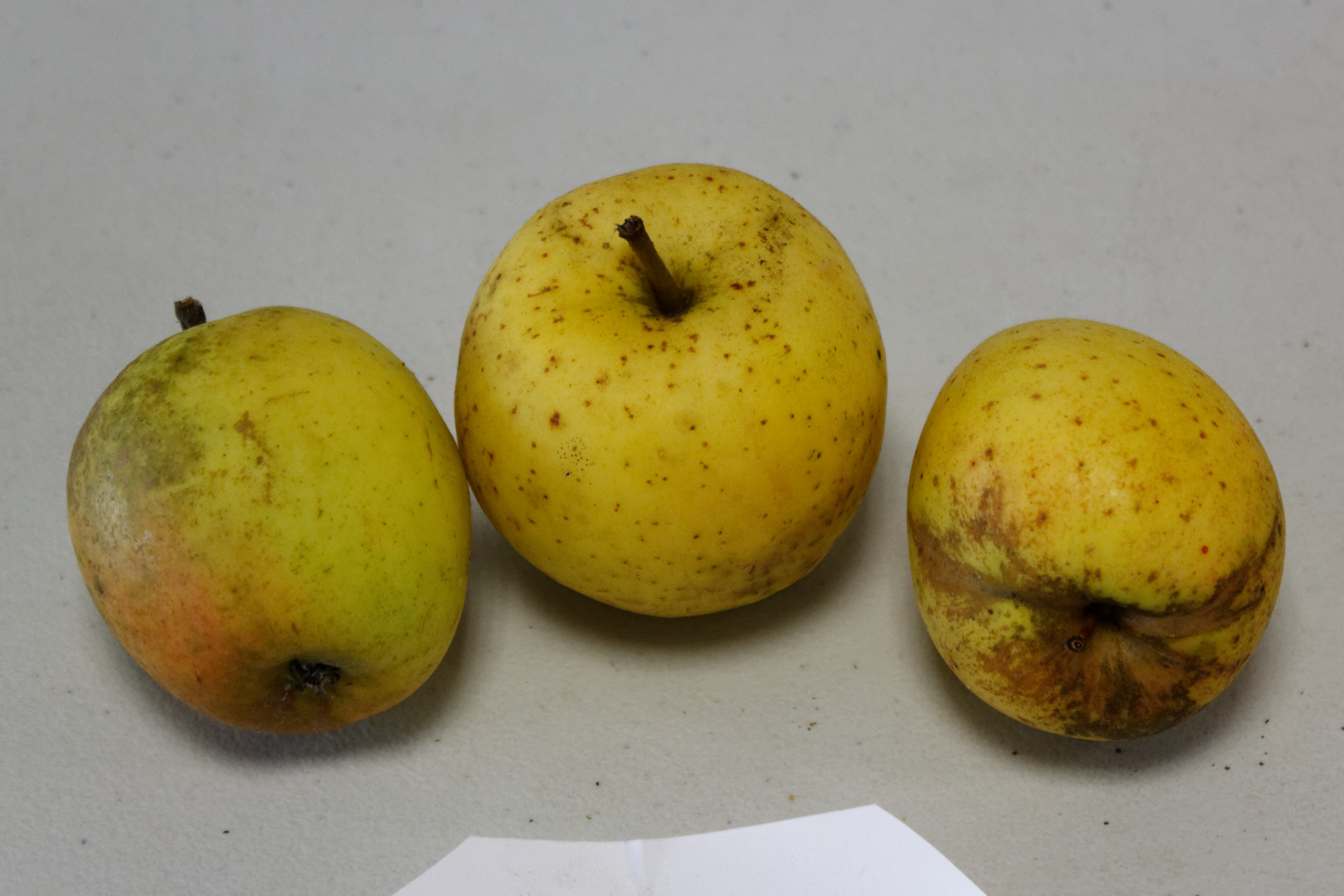 Pomme photographiée à l'OPL Peillac/Les Fougerêts.